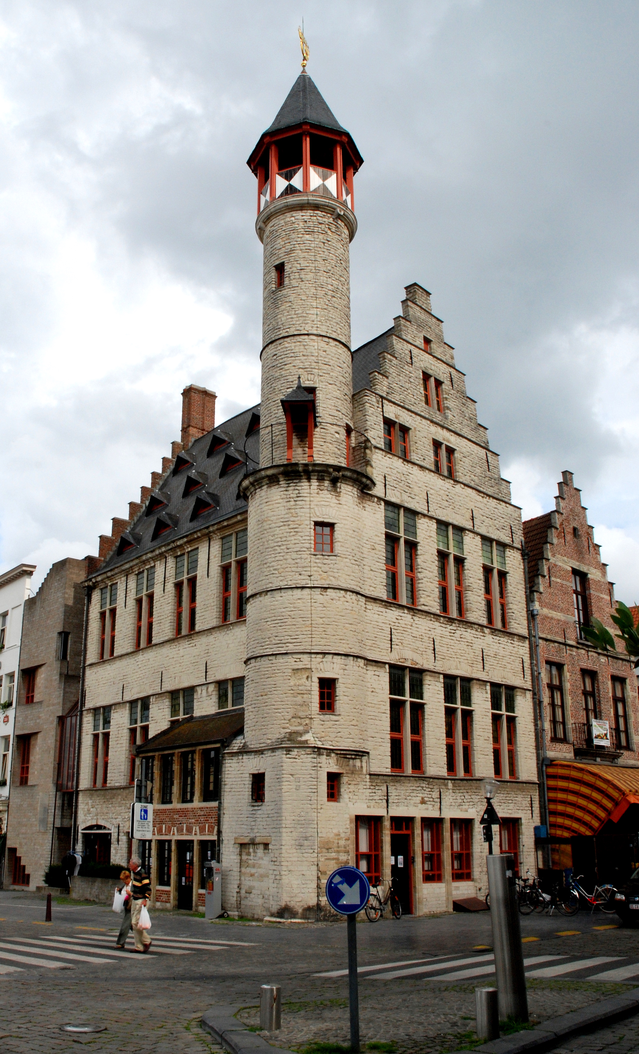 Het Toreken (15e-eeuws ambachtshuis) op de Vrijdagmarkt te Gent, België